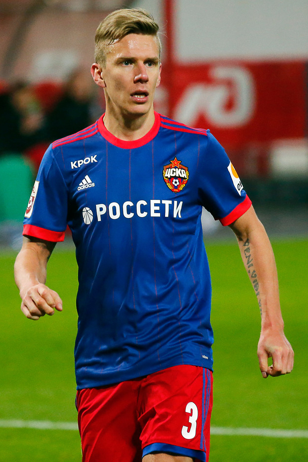 «Локомотив» - ЦСКА